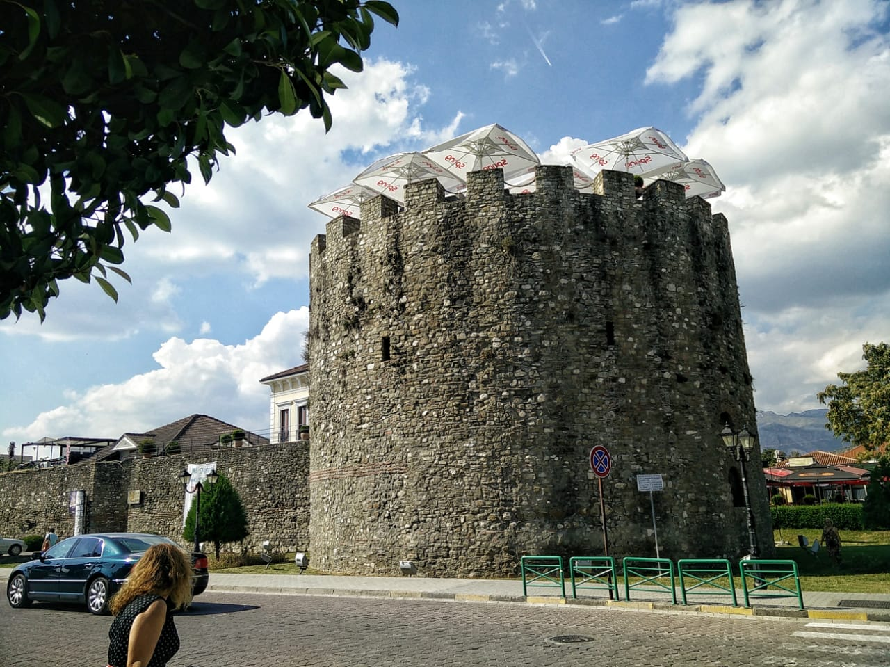 Kalaja e Elbasanit